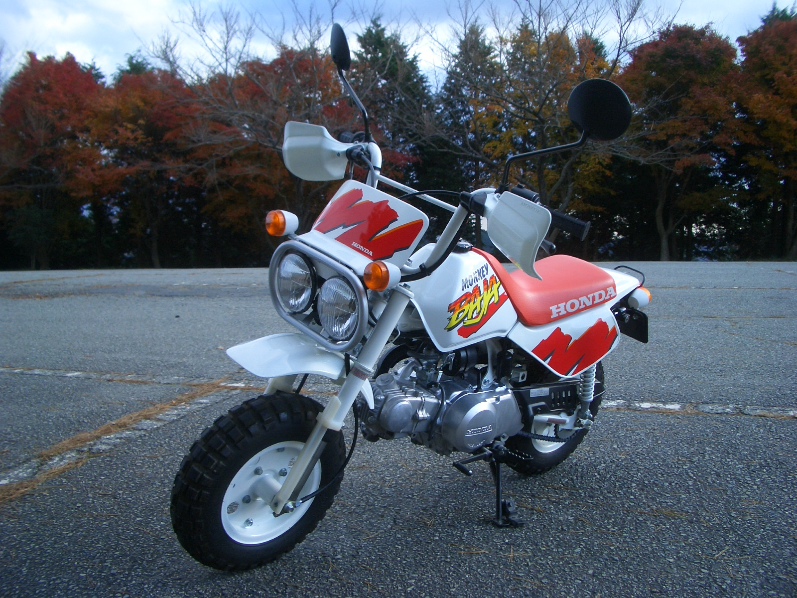 ホンダ・モンキーバハ。1991年式。